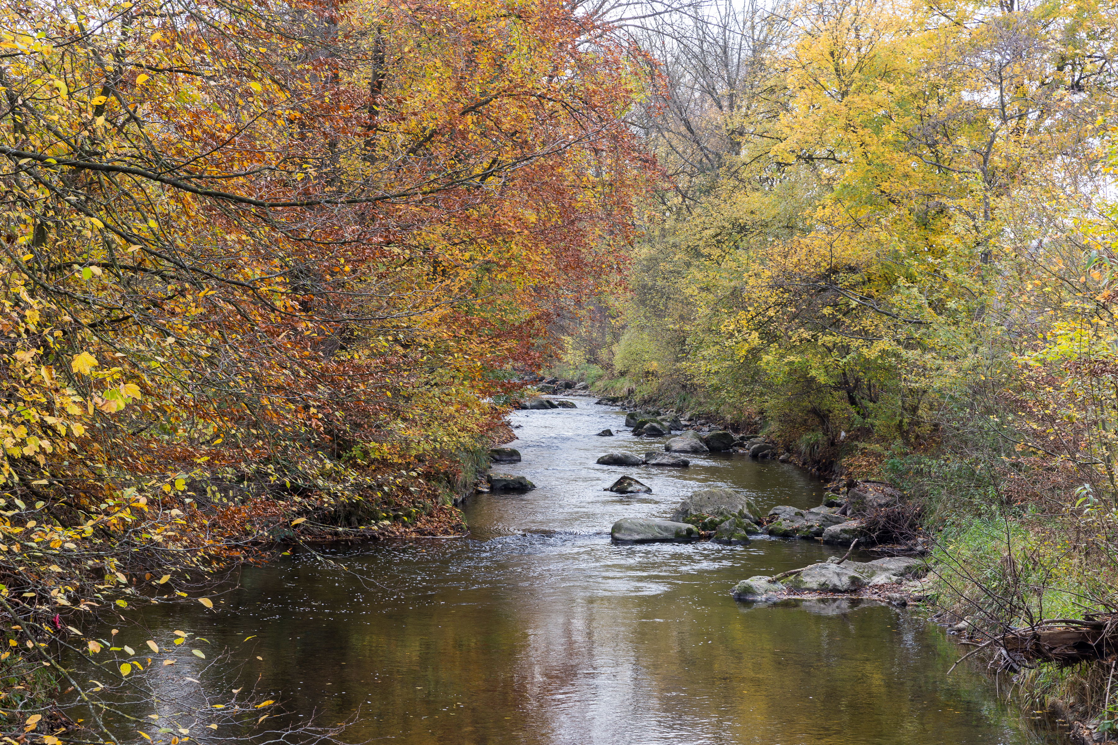 Lauf der Suhre zwischen Suhr und Oberentfelden